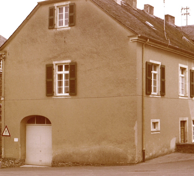 Ehemaliges Spritzenhaus der Lösnicher Feuerwehr im alten Schulgebäude von 1839 um 1980.